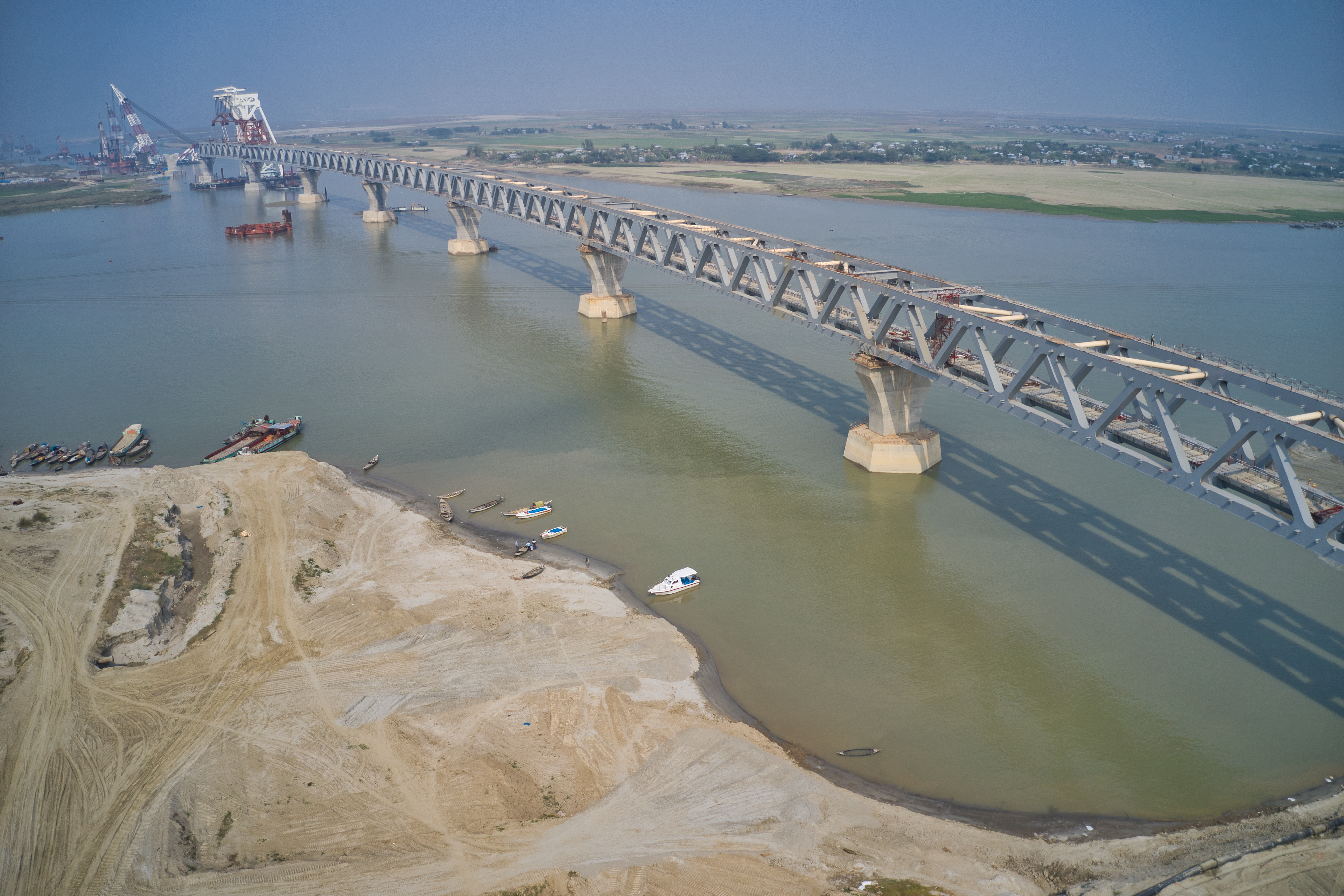 পদ্মা সেতু